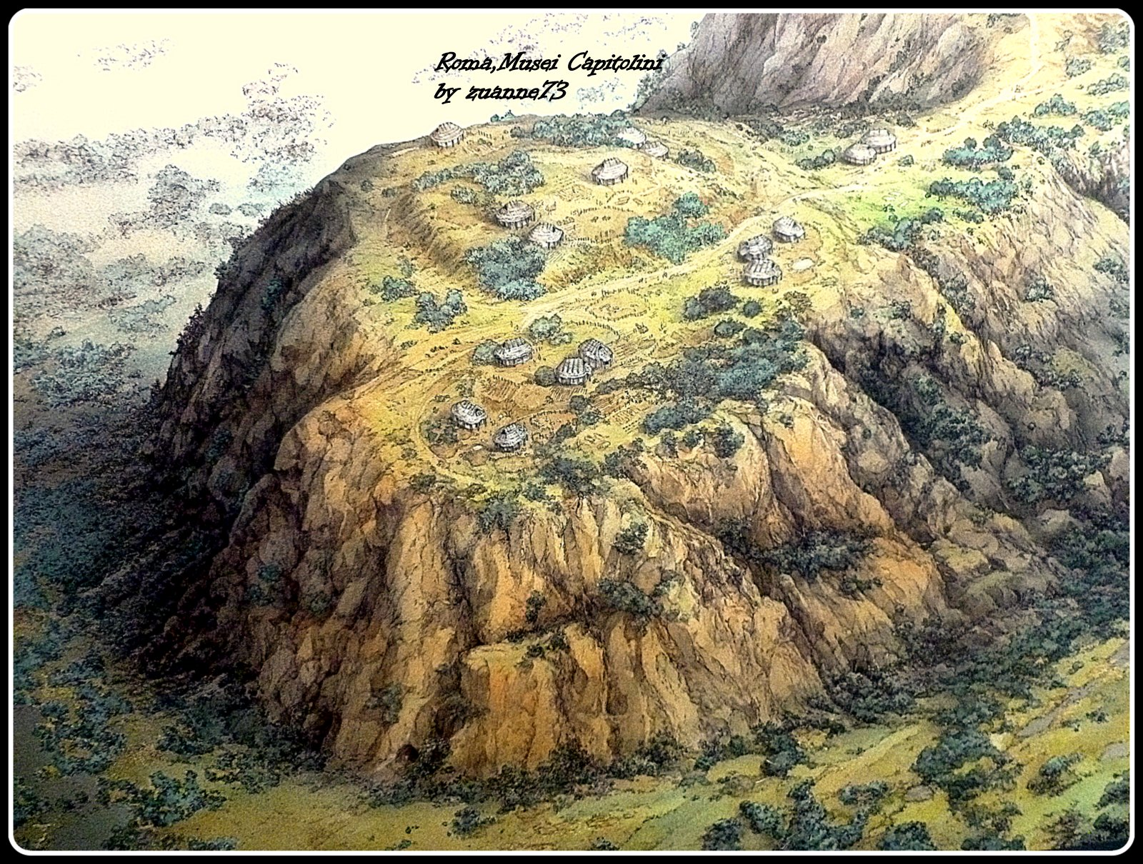 Roma,Colle Capitolino,primo Periodo